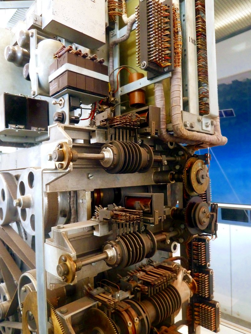 Anrufbeantworter Ipsophone mit Riemenantrieb und Röhrentechnik